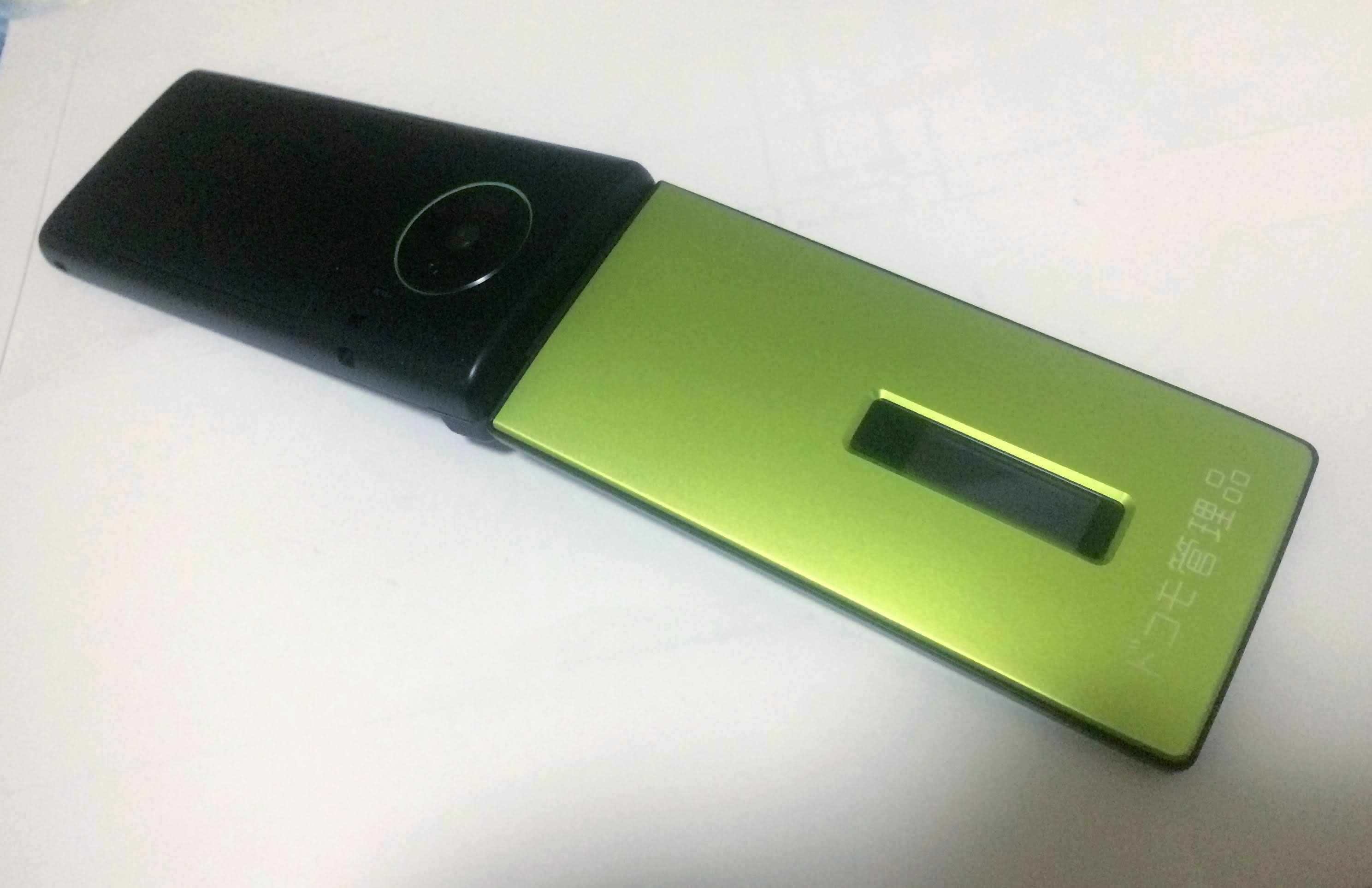 SH-07F 緑色の外観（ドコモ管理品）